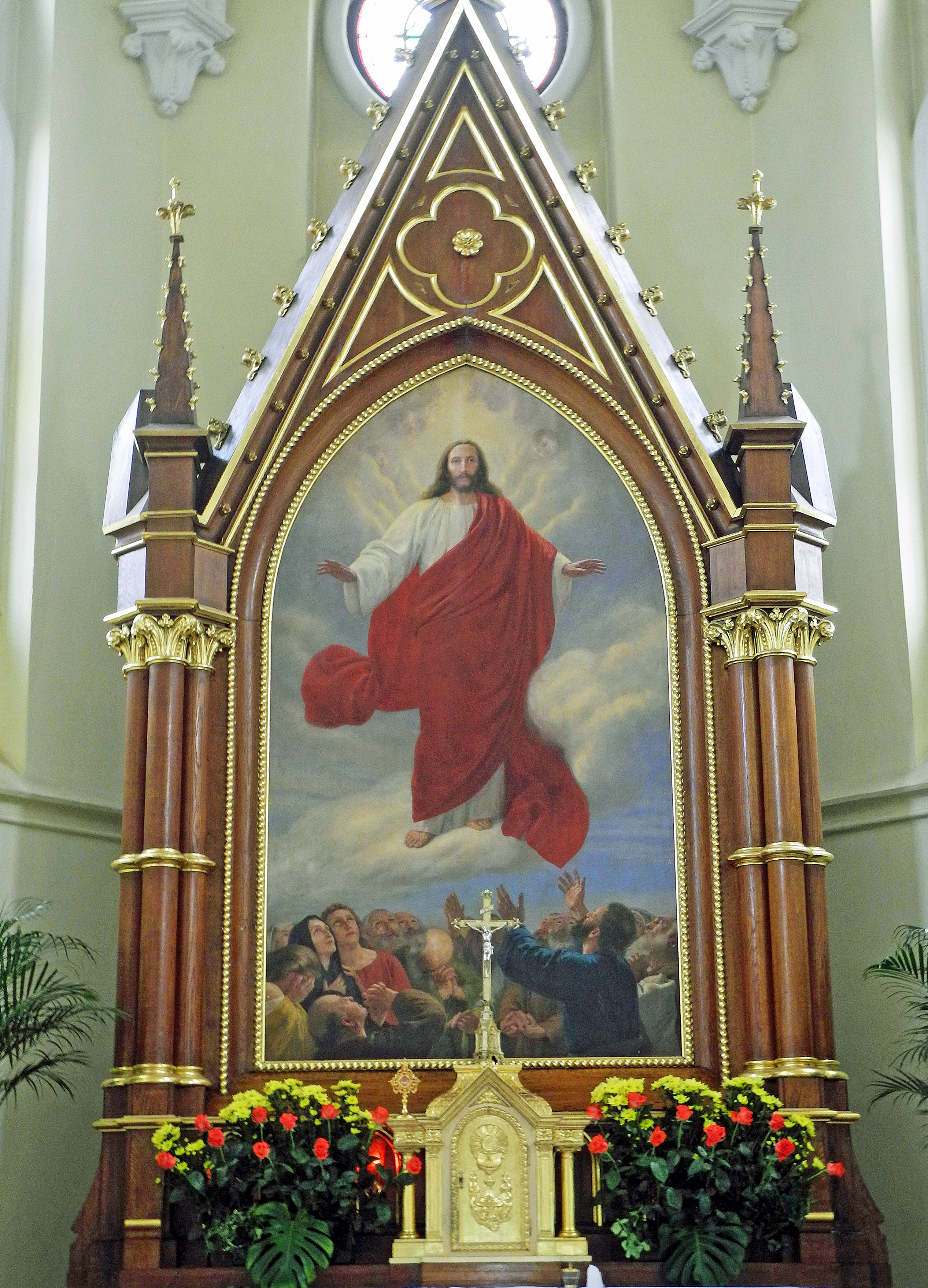 Altarraum der ehem. Evangelischen Kirche Christi Himmelfahrt in Żyrardów, jetzt röm.-kath. Pfarrkirche Christi Himmelfahrt, mit dem Altarbild „Christi Himmelfahrt“ von August Frind, gemalt in München.